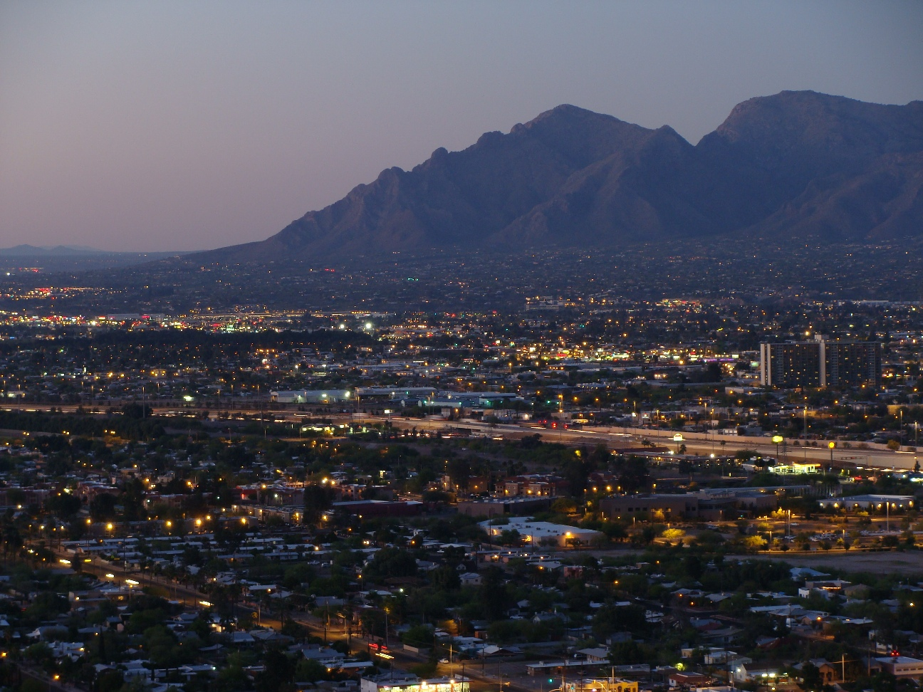 Tucson, Arizona